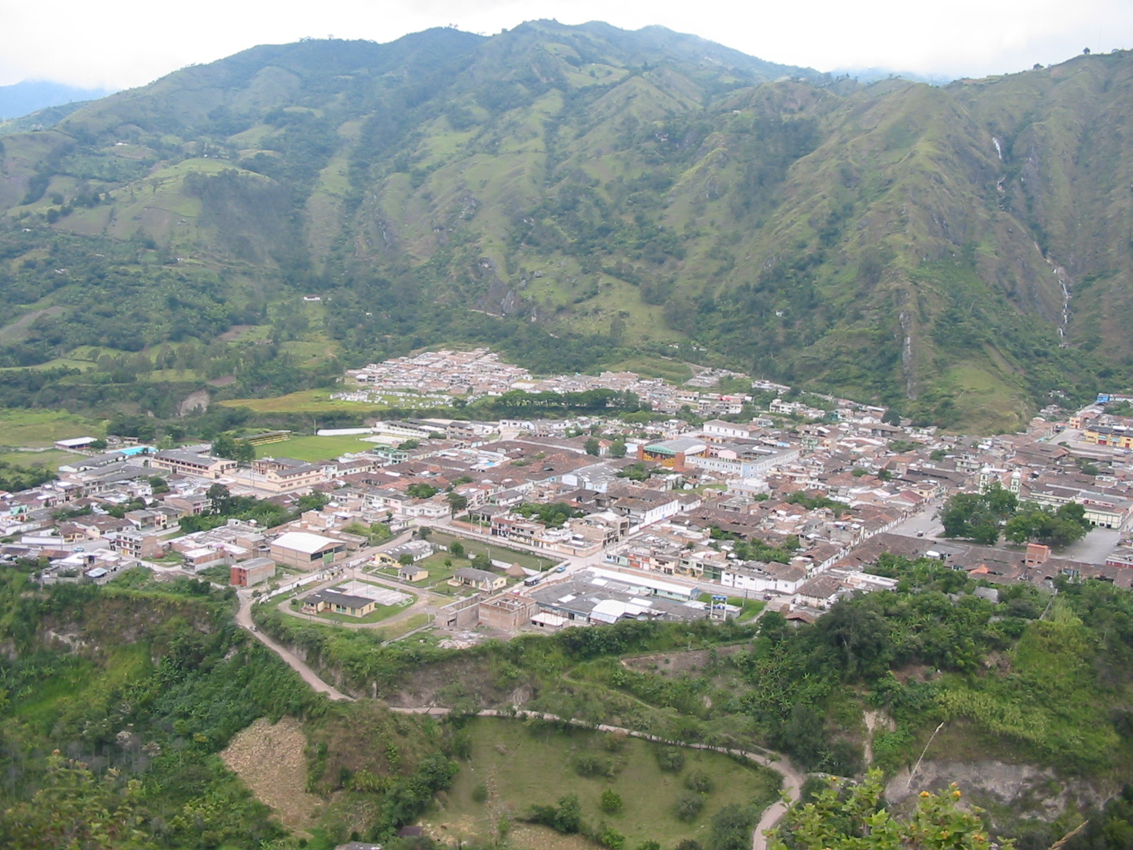 "san pablo nariño"